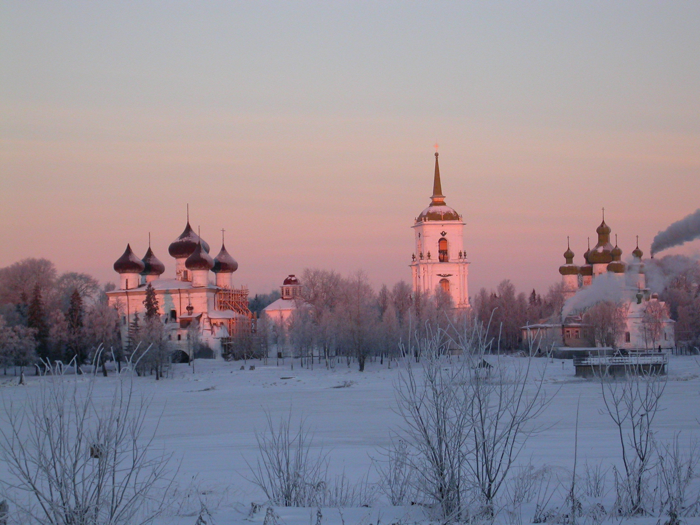 Соборная площадь утром